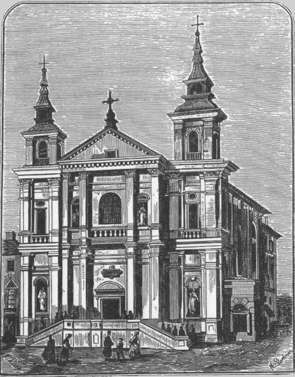 Kościół św. Ducha przy ul. Długiej 3 w Warszawie (oo. Paulinów)